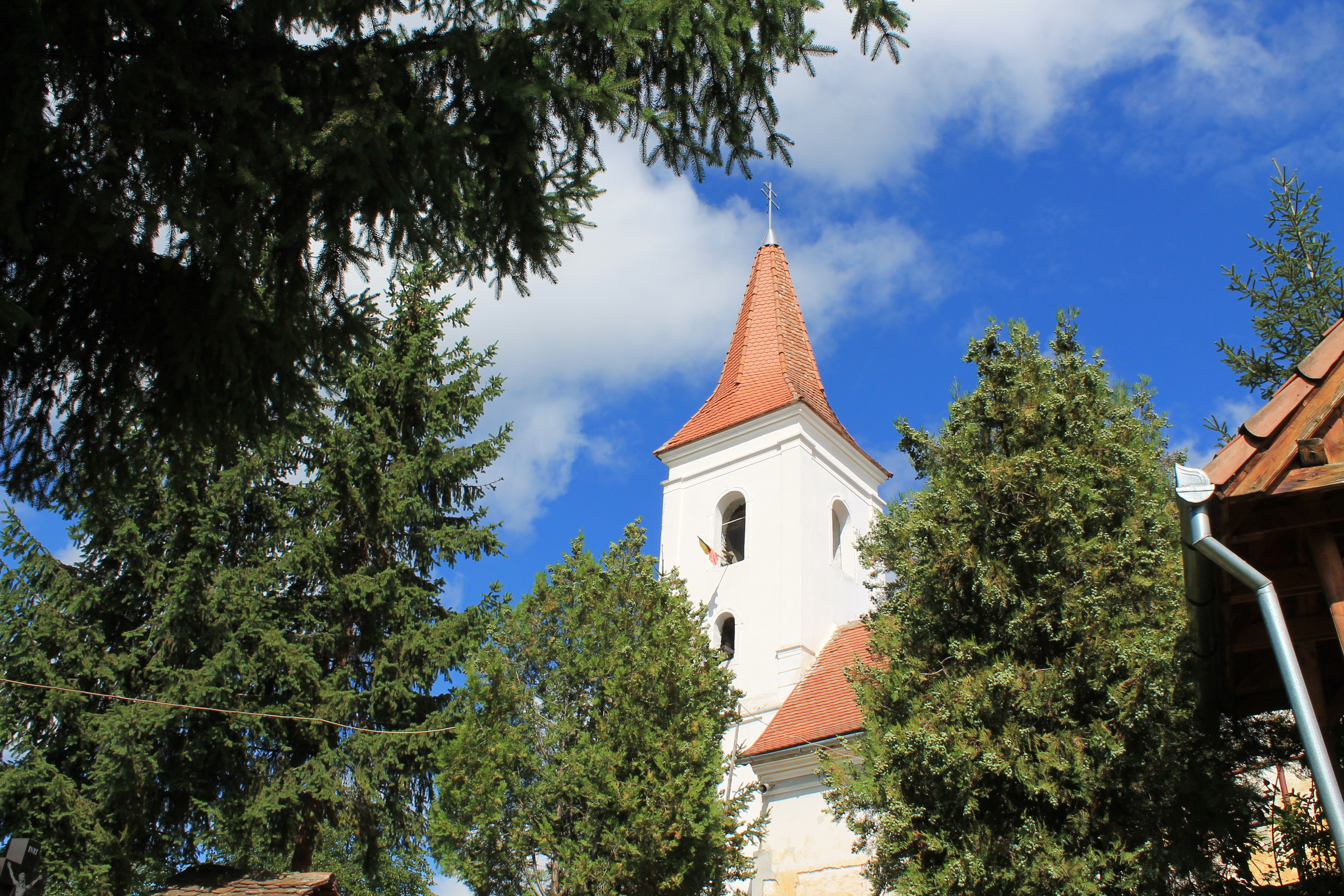 Ansamblul rural "Centrul istoric al localității"